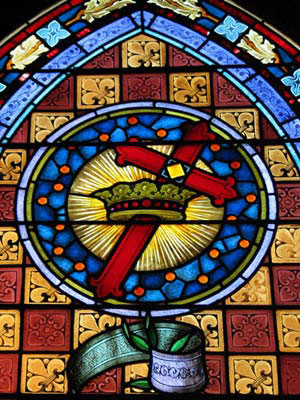 tryyu